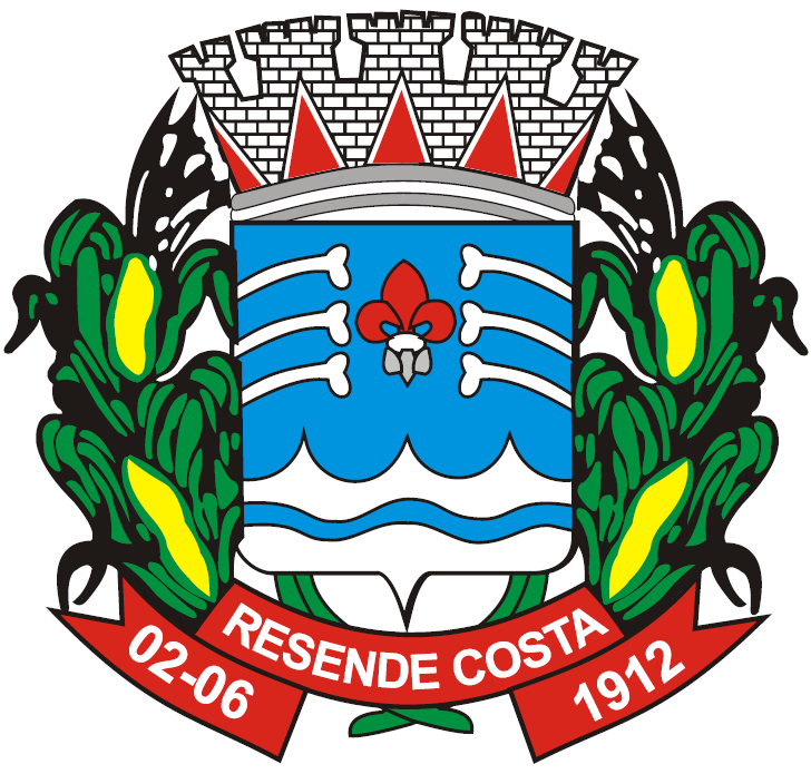 Brasão de armas do município de Resende Costa